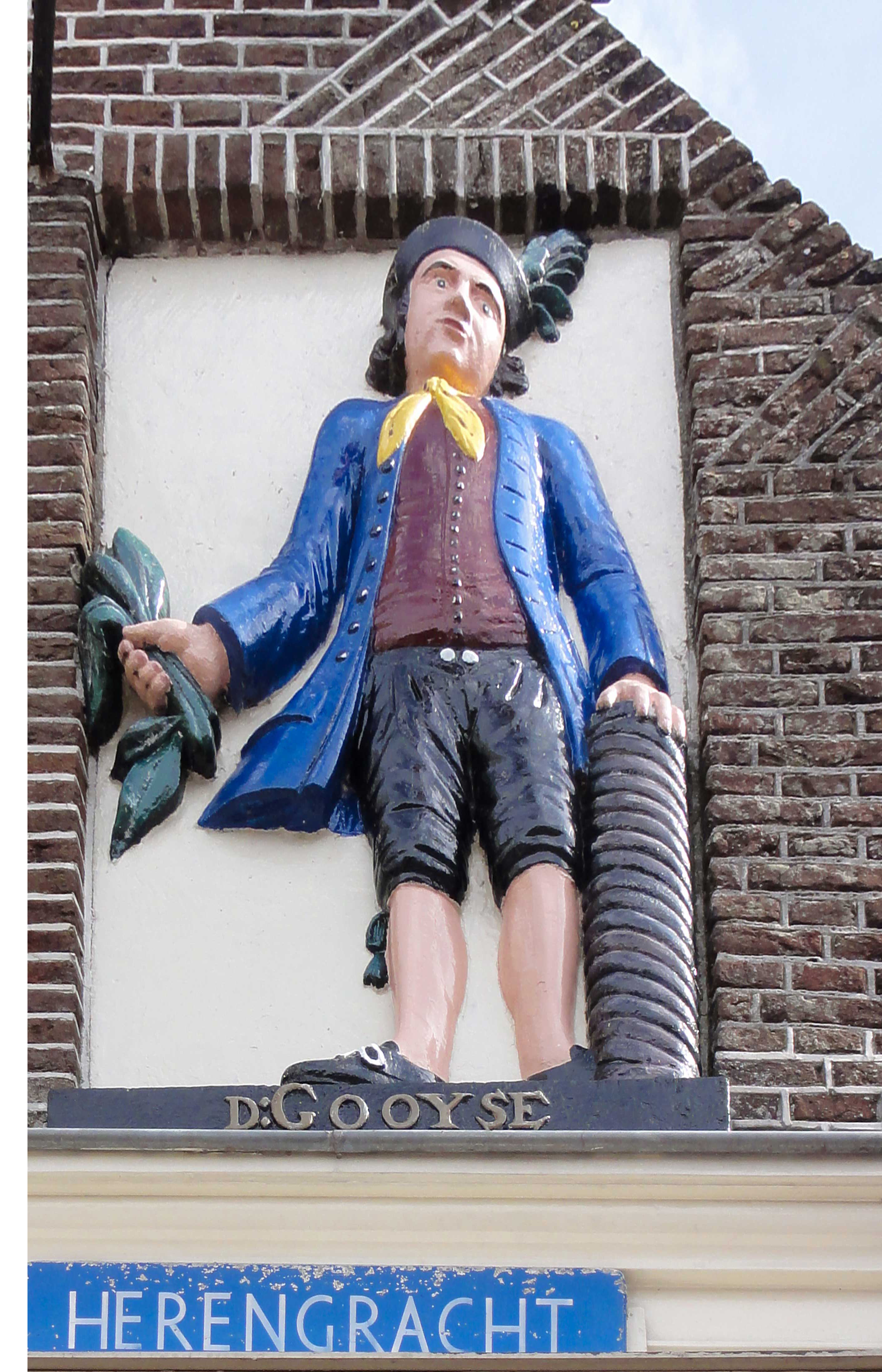 Gevelreliëf "de Gooyse Boer" bij café ome Ko in Muiden